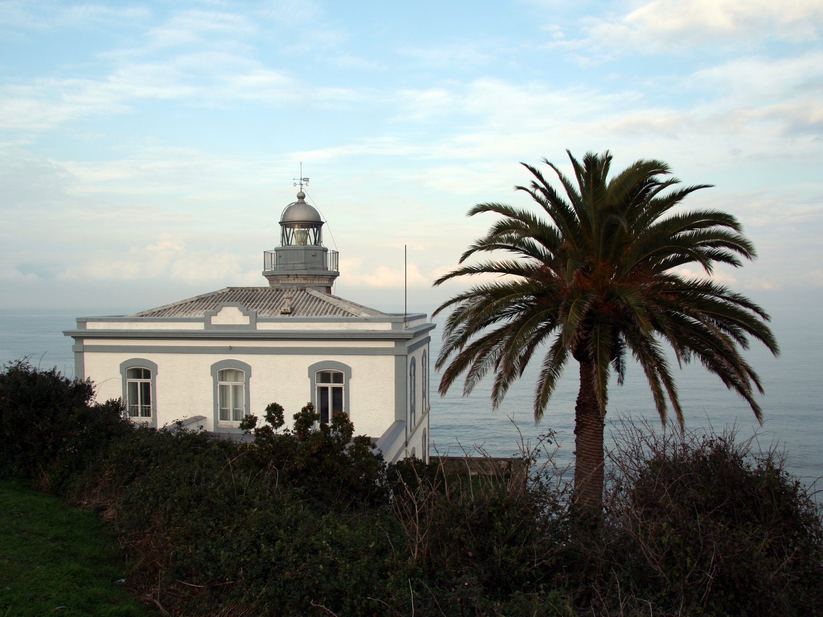 Faro de Candás Autor: Ramón Noriega